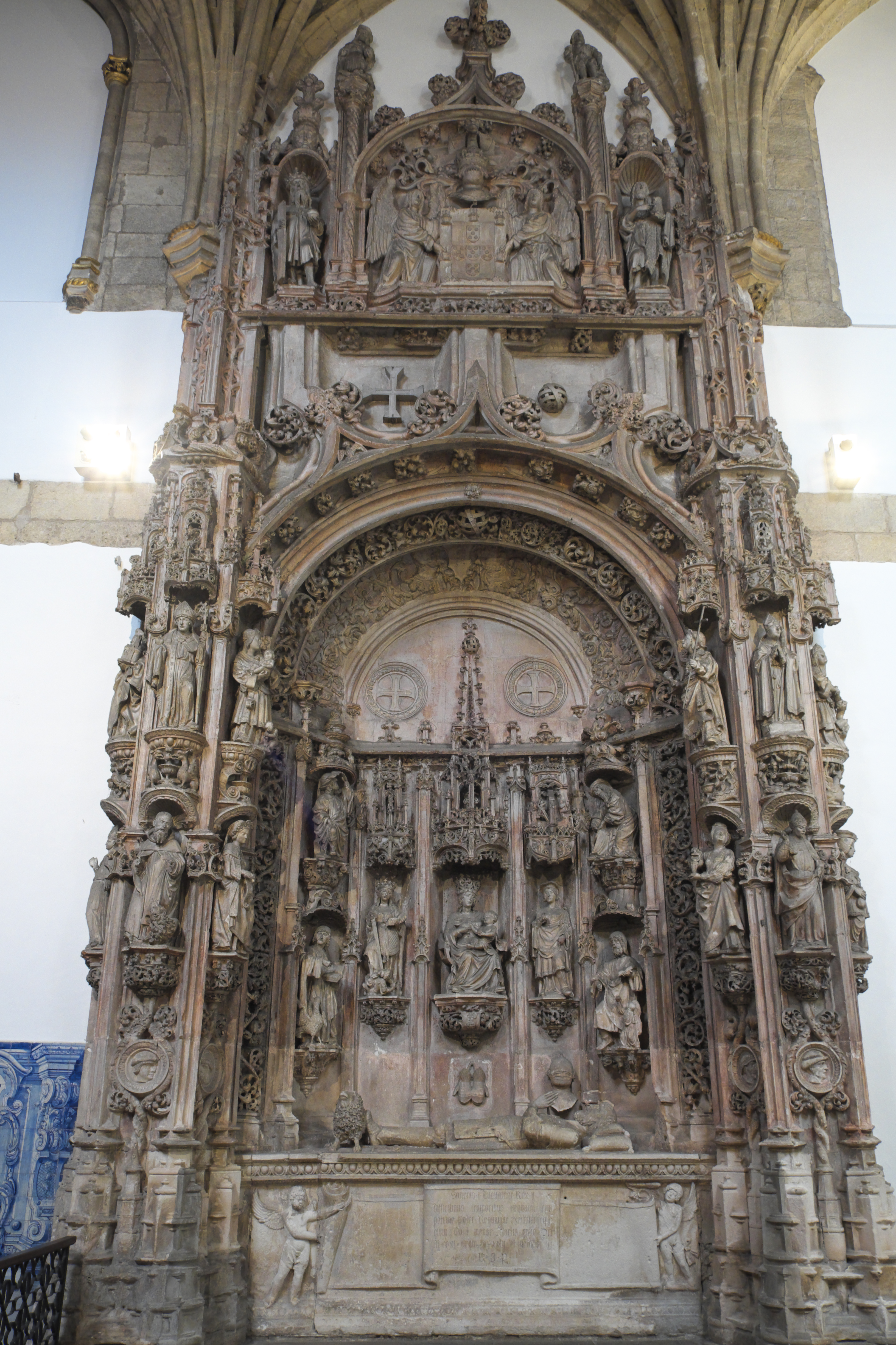 Grabmal von Sancho I. in der ehemaligen Augustinerchorherrenstiftskirche Santa Cruz in Coimbra (Portugal)